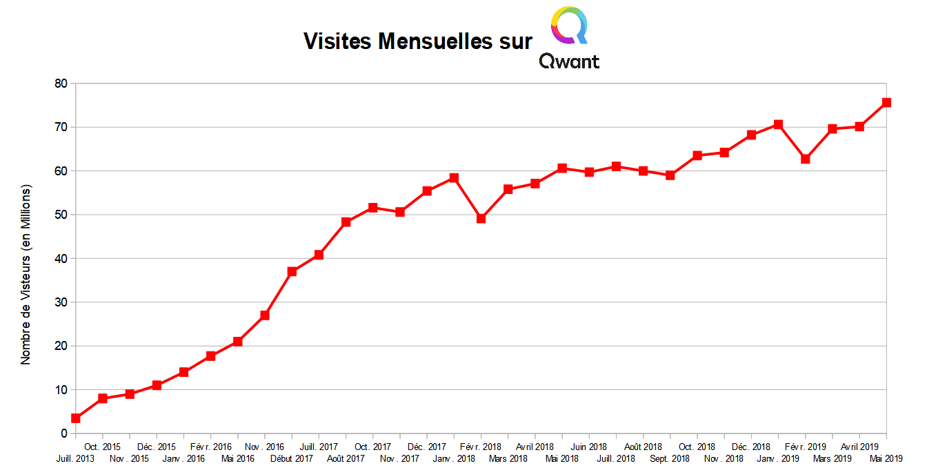 Graphique de l'évolution du nombre de visiteurs sur "Qwant". Source des informations contenues dans le graphique